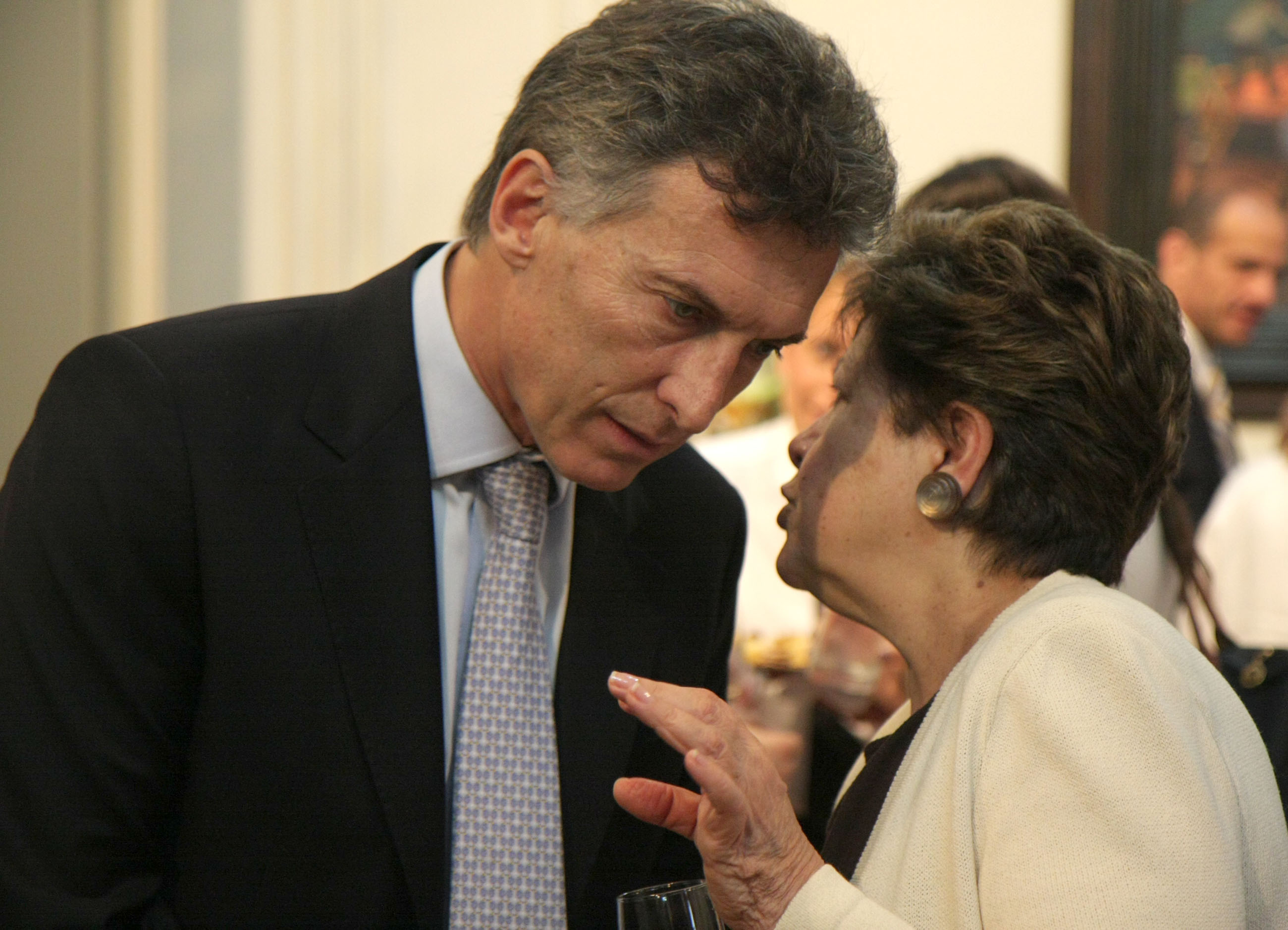 Buenos Aires. Diciembre 15 de 2011. Baires. Diciembre 15 de 2011. El Jefe de Gobierno porteño, Mauricio Macri, dialoga con la Embajadora de Estado Unidos en la Argentina, Vilma Socorro Martinez, durante la recepción que brindó el gobierno de la ciudad al Cuerpo Diplomático.- Foto María ïnes Ghiglione-gv/GCBA.- Area Fotografía Secretaria de Medios G.C.B.A. Av. de Mayo 575-3p#306 4323-9661